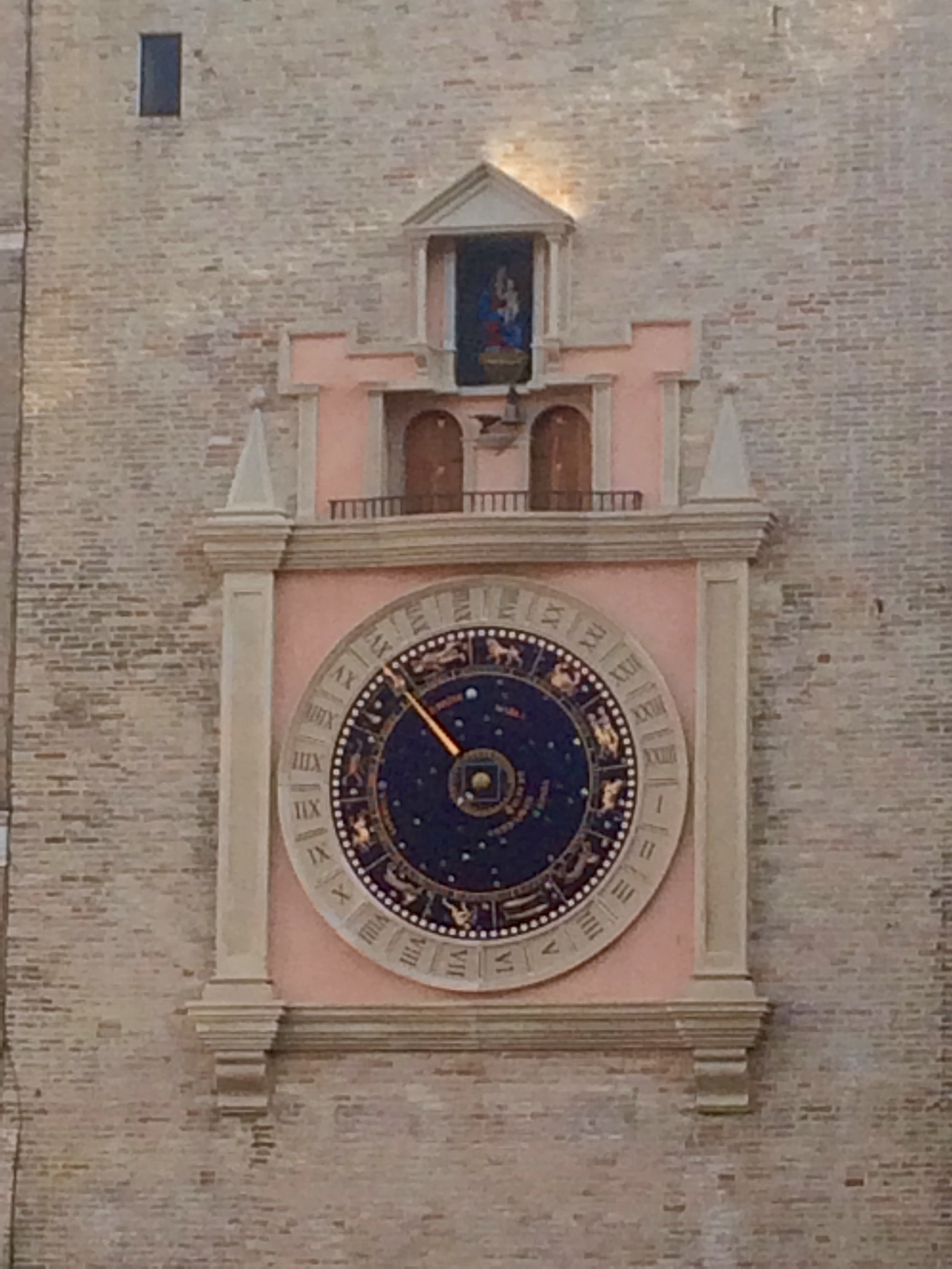 Torre civica This is a photo of a monument which is part of cultural heritage of Italy.